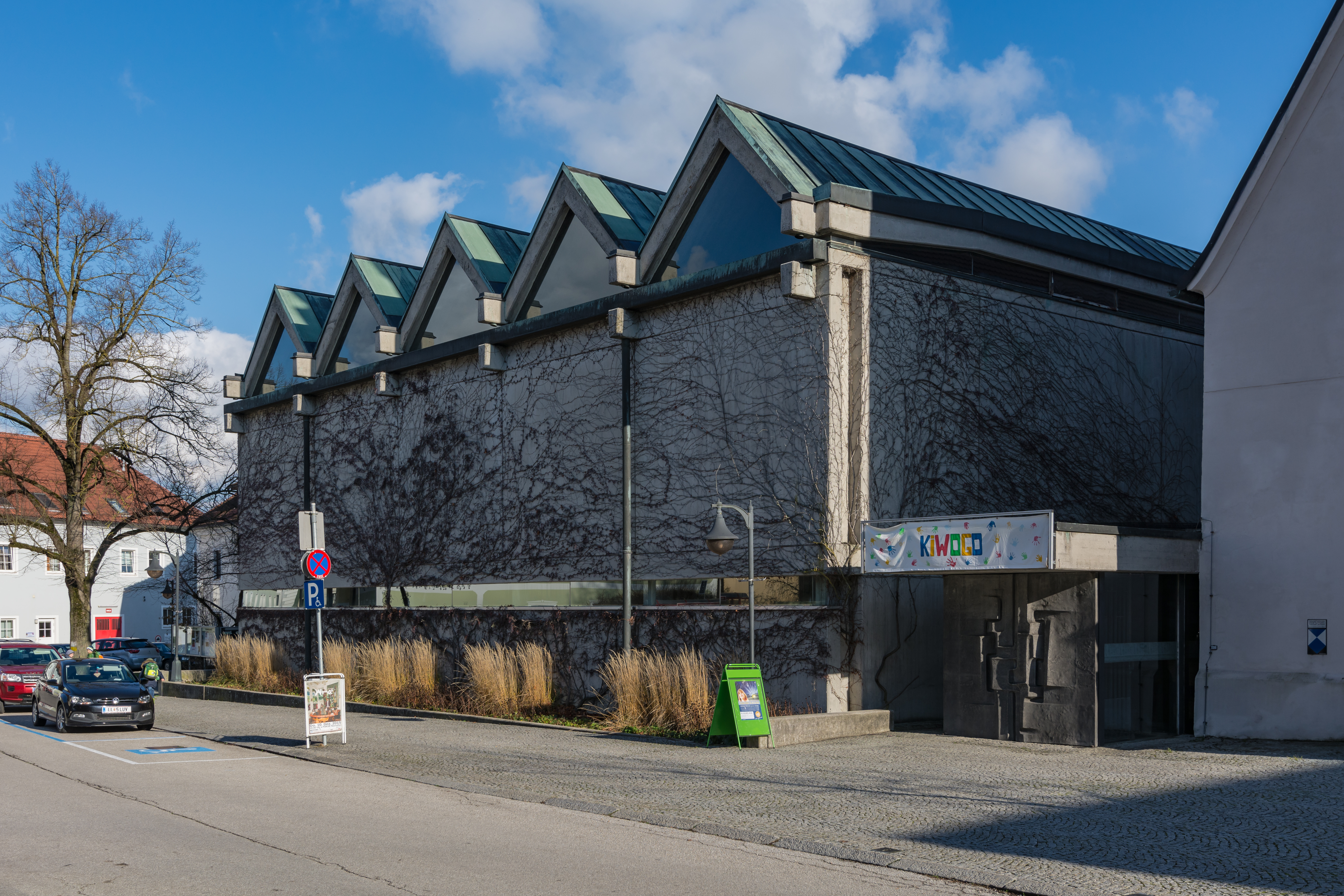 Kath. Pfarrkirche hl. Matthäus, Anbau aus der 70er Jahren des 20. Jahrhunderts